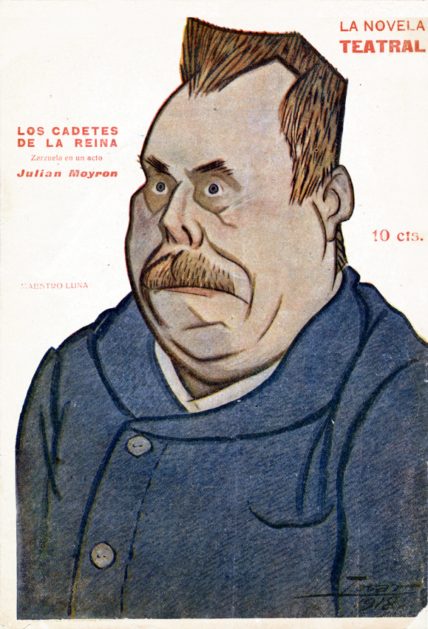 Caricatura del maestro Luna (Pablo Luna).